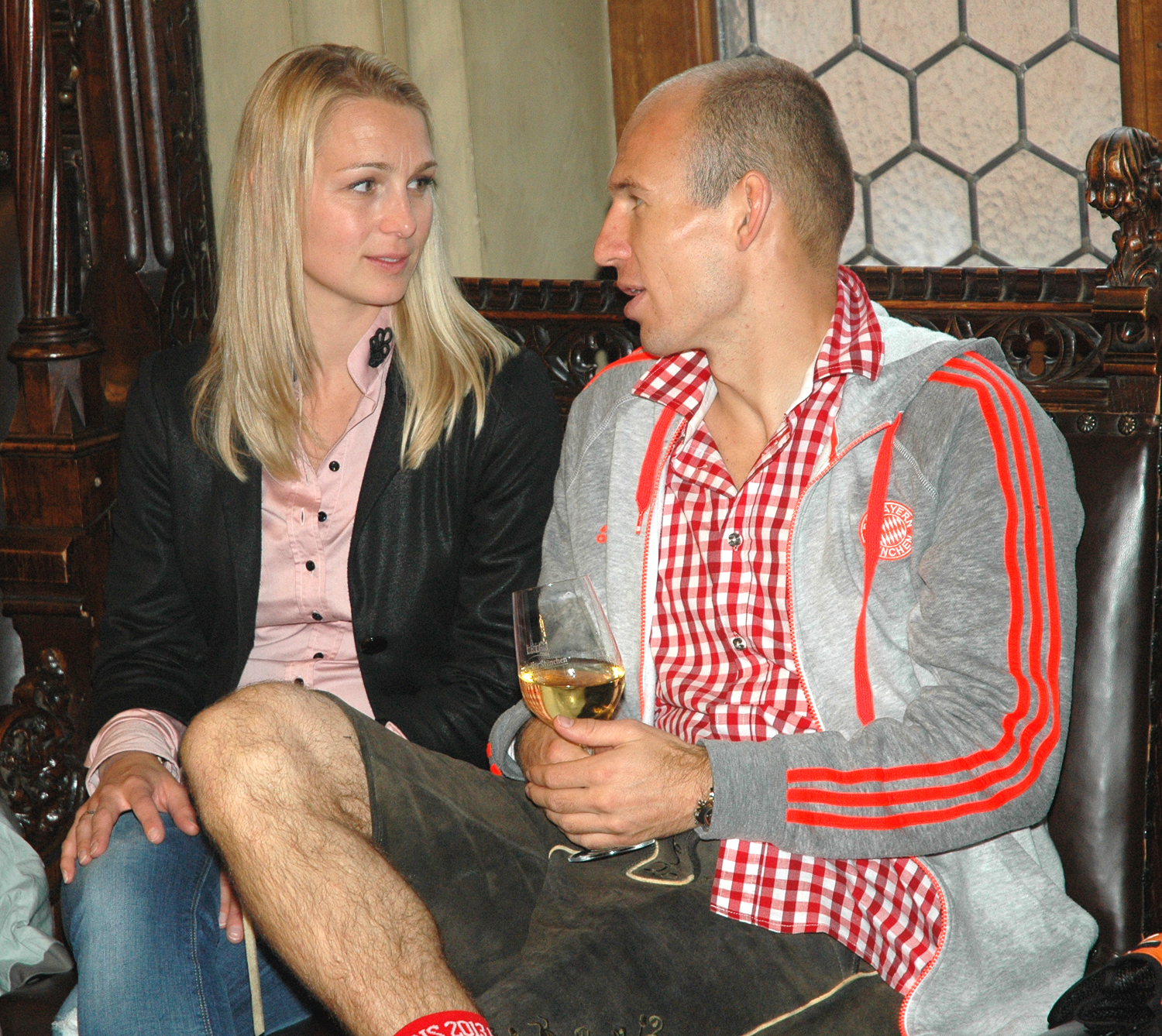 Bernadine und Arjen Robben während der Siegesfeier des FC-Bayern im Münchner Rathaus